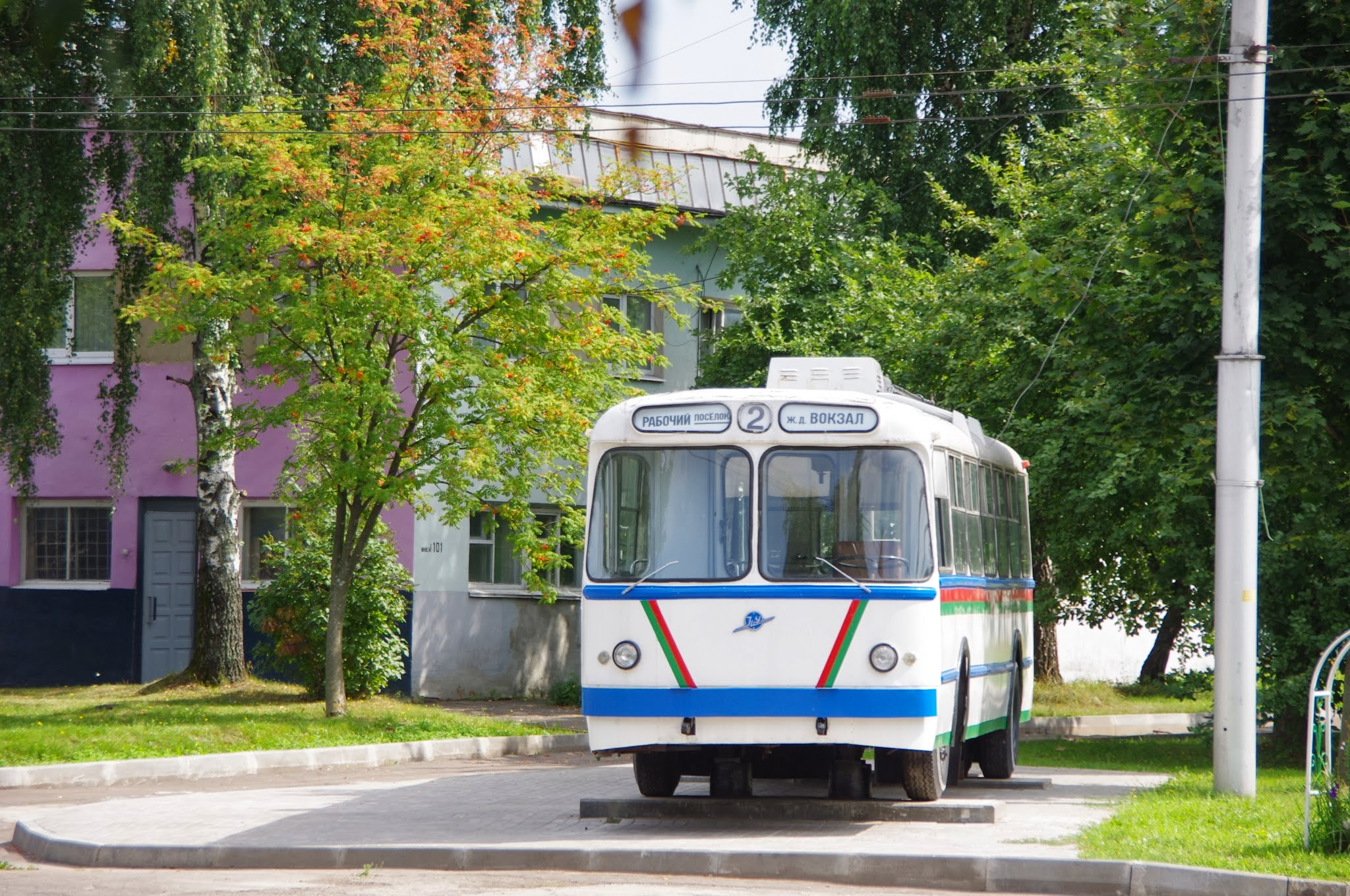 Рабочий пос., Могилёв, Belarus